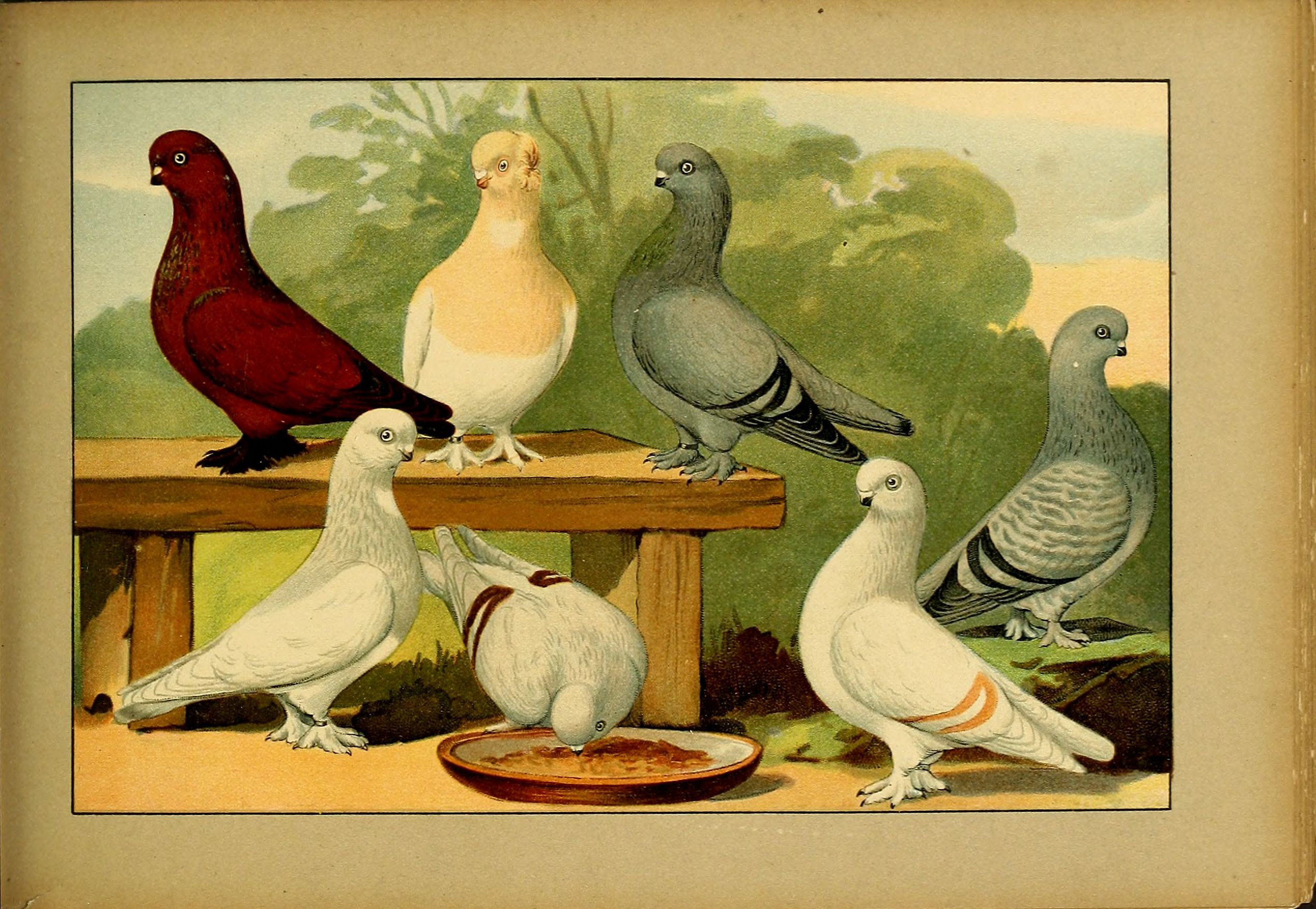 Deutsch